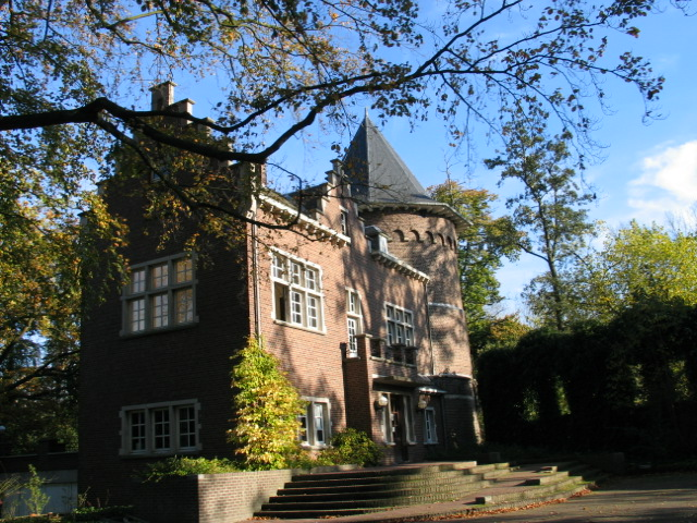 Prinsenhof te Kuringen - eigen foto